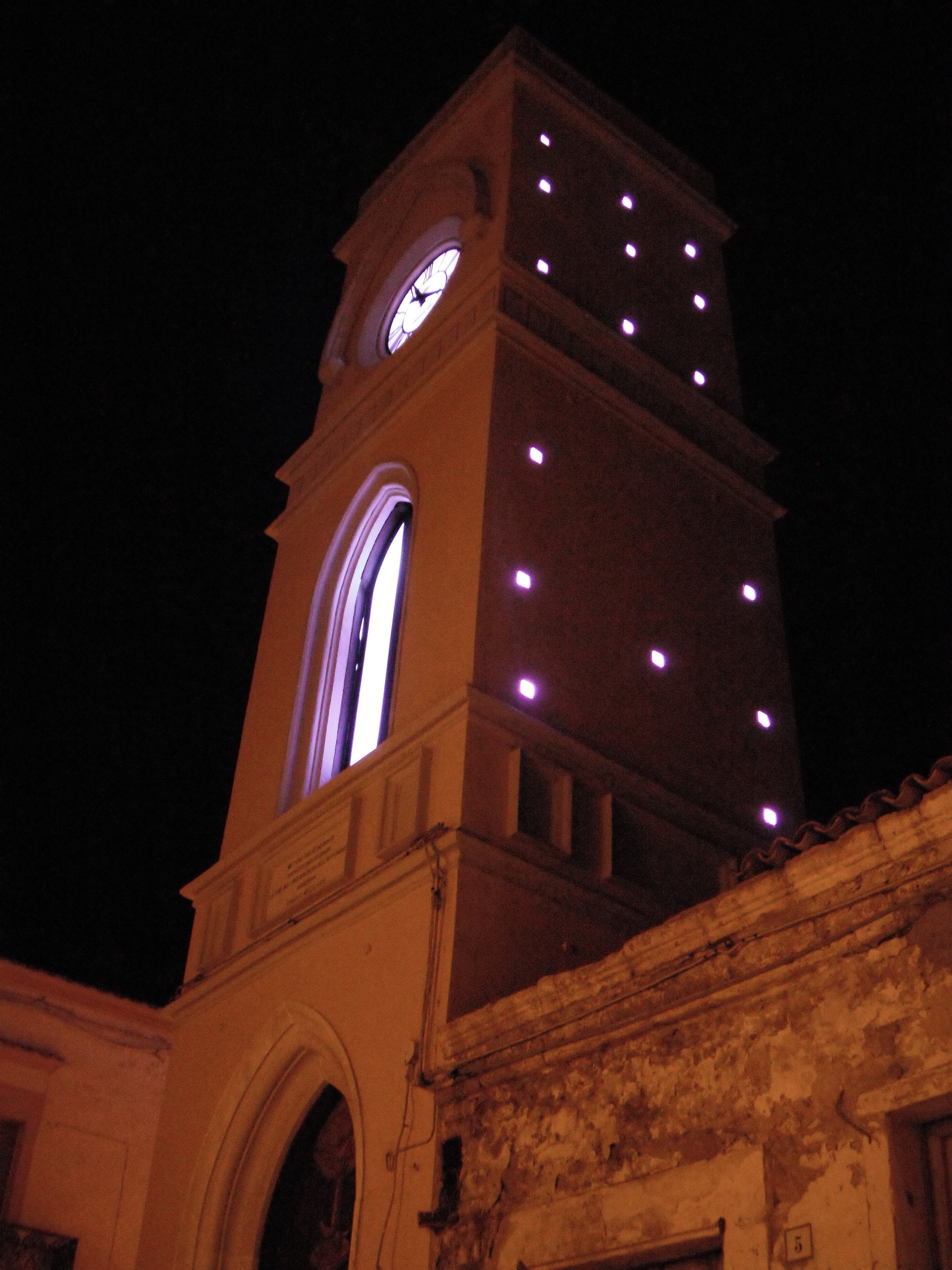 Torre dell'Orologio, con illuminazione notturna.